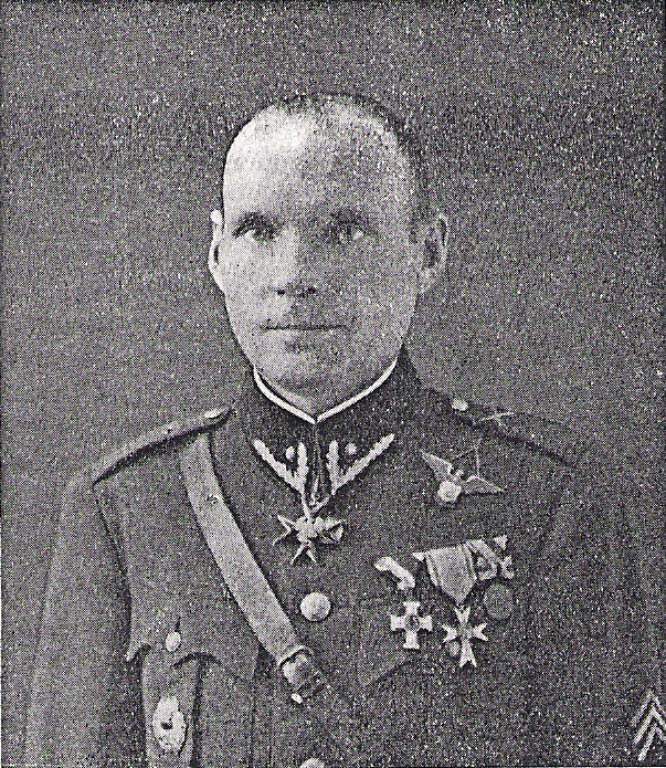 Karl Soo. Foto on pärit Nõukogude Liidu poolt likvideeritud Kaitseliidu arhiivist. Fotol olev inimene on mõrvatud 1941.a.